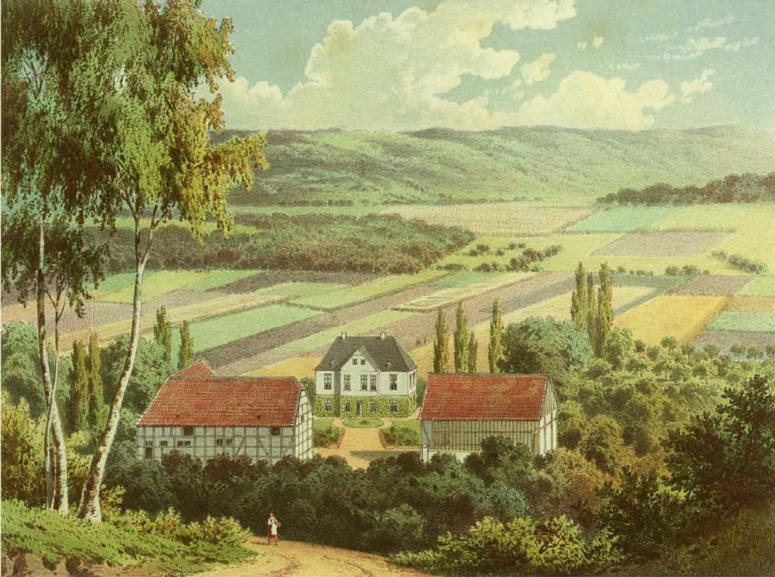 Haus Echthausen, Kreis Arnsberg